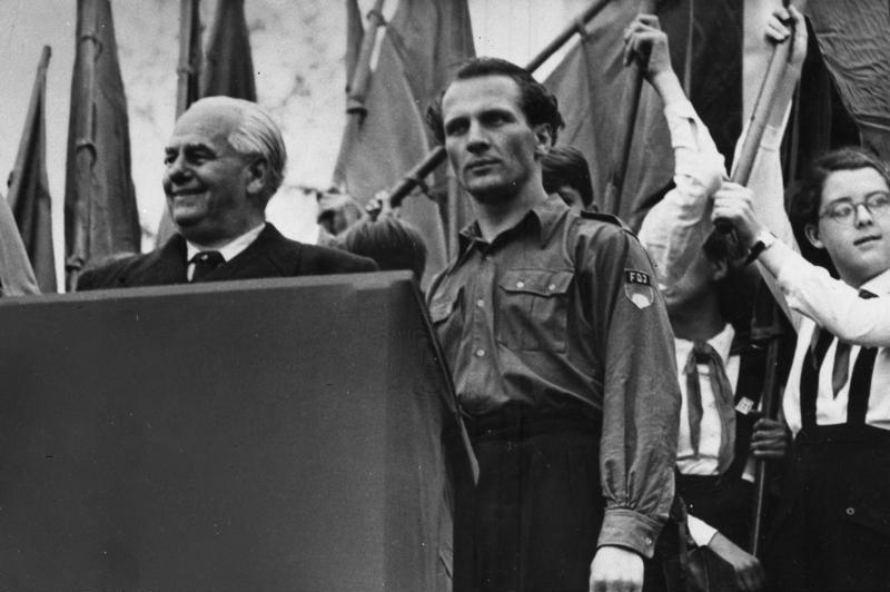 Berlin, Eröffnung der Pionierrepublik ADN-ZB/Lazarus/24.5.1959/Berlin: Anläßlich des I. Deutschlandtreffens der Jugend wurde am 24.5.1950 die Republik der Jungen Pioniere in der Wuhlheide eröffnet, in der 20000 Jungen und Mädchen untergebracht sind. Präsident Wilhelm Pieck und Erich Honecker Vorsitzender des Zentralrates der FDJ, auf der Ehrentribüne. 6656-50 Abgebildete Personen: Pieck, Wilhelm: Präsident, Politbüro der SED, Vorsitzender der KPD, DDR Honecker, Erich: Staatsratsvorsitzender, Generalsekretär des ZK der SED, DDR (PND 118553399)